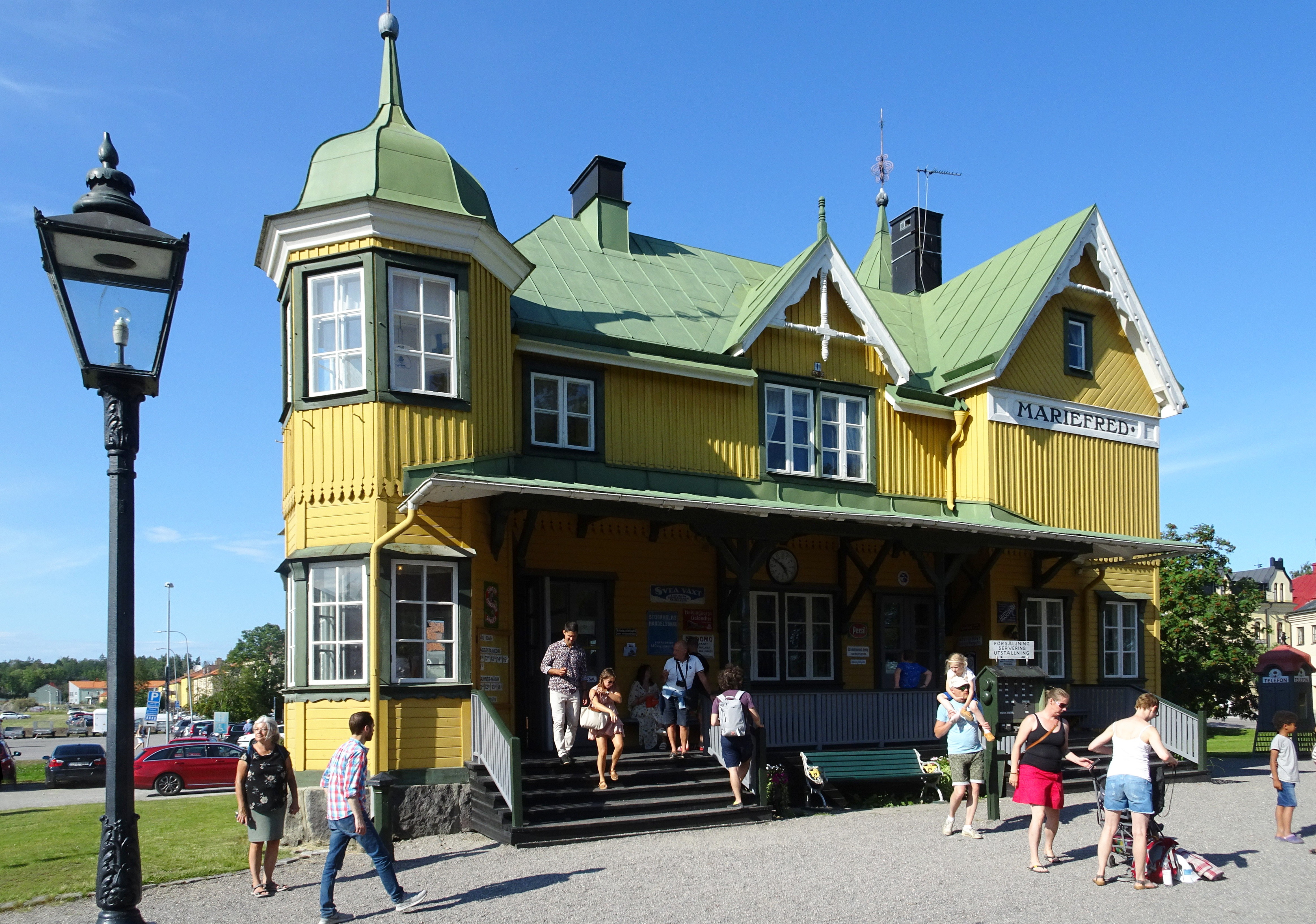 Mariefreds järnvägsstation